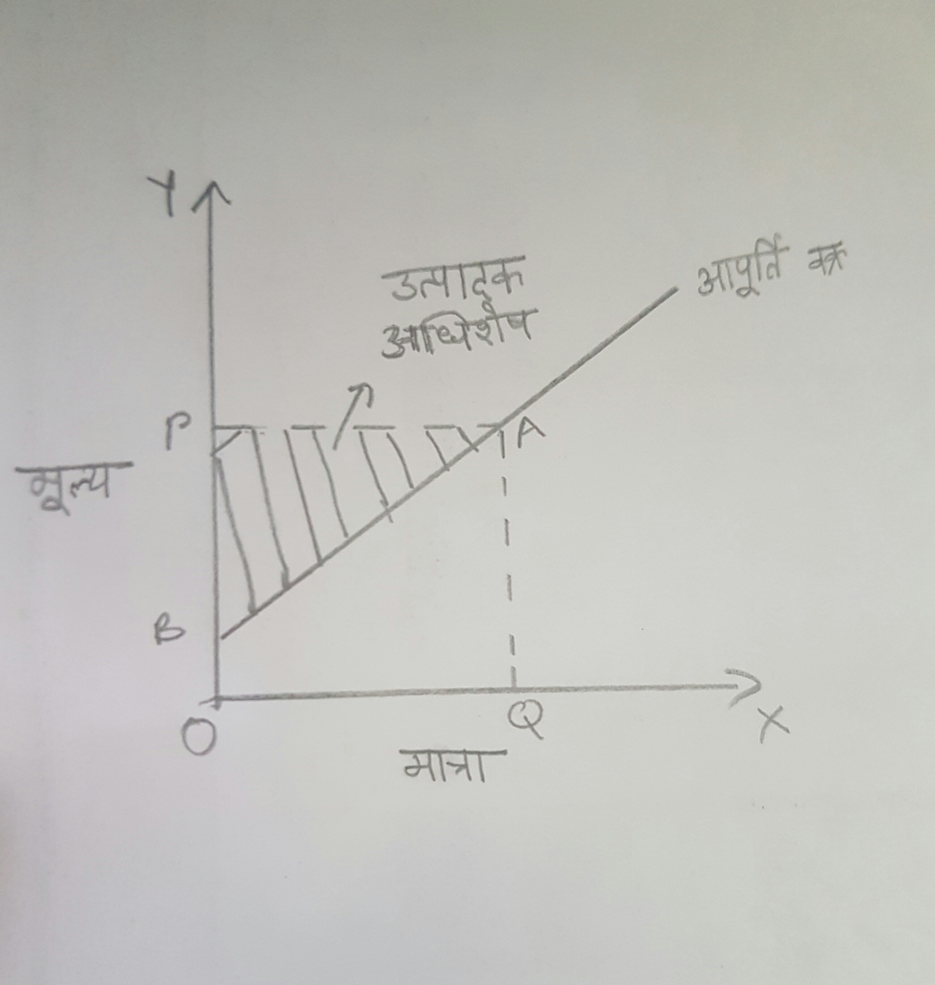 आपूर्ति वक्र द्वारा उत्पादक अधिशेष का प्रतिनिधित्व